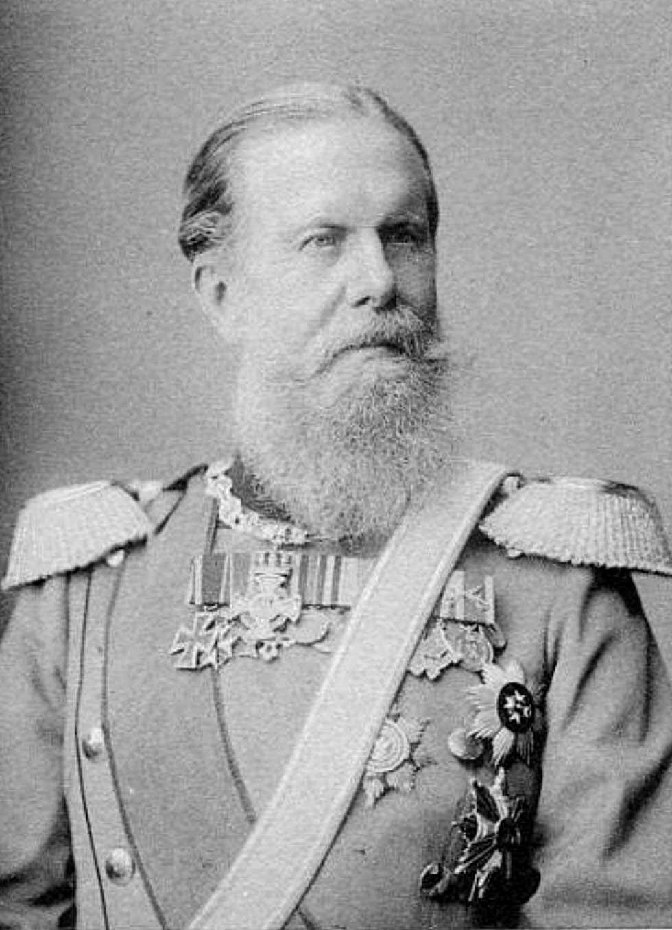 Hermann von Sachsen-Weimar-Eisenach (1825-1901)